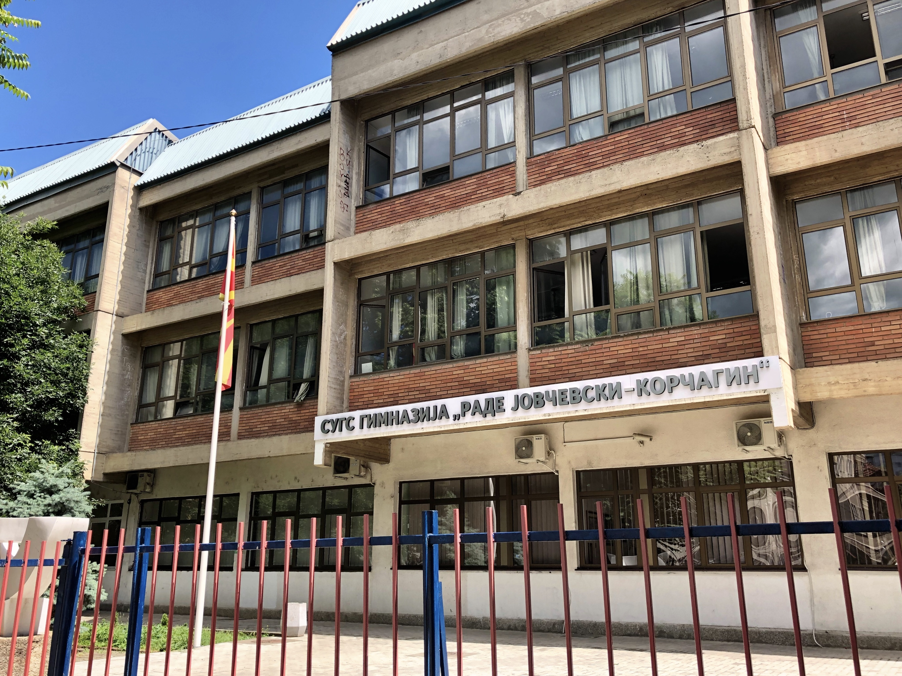 Skopje, Macedonia Skopje, Macedonia